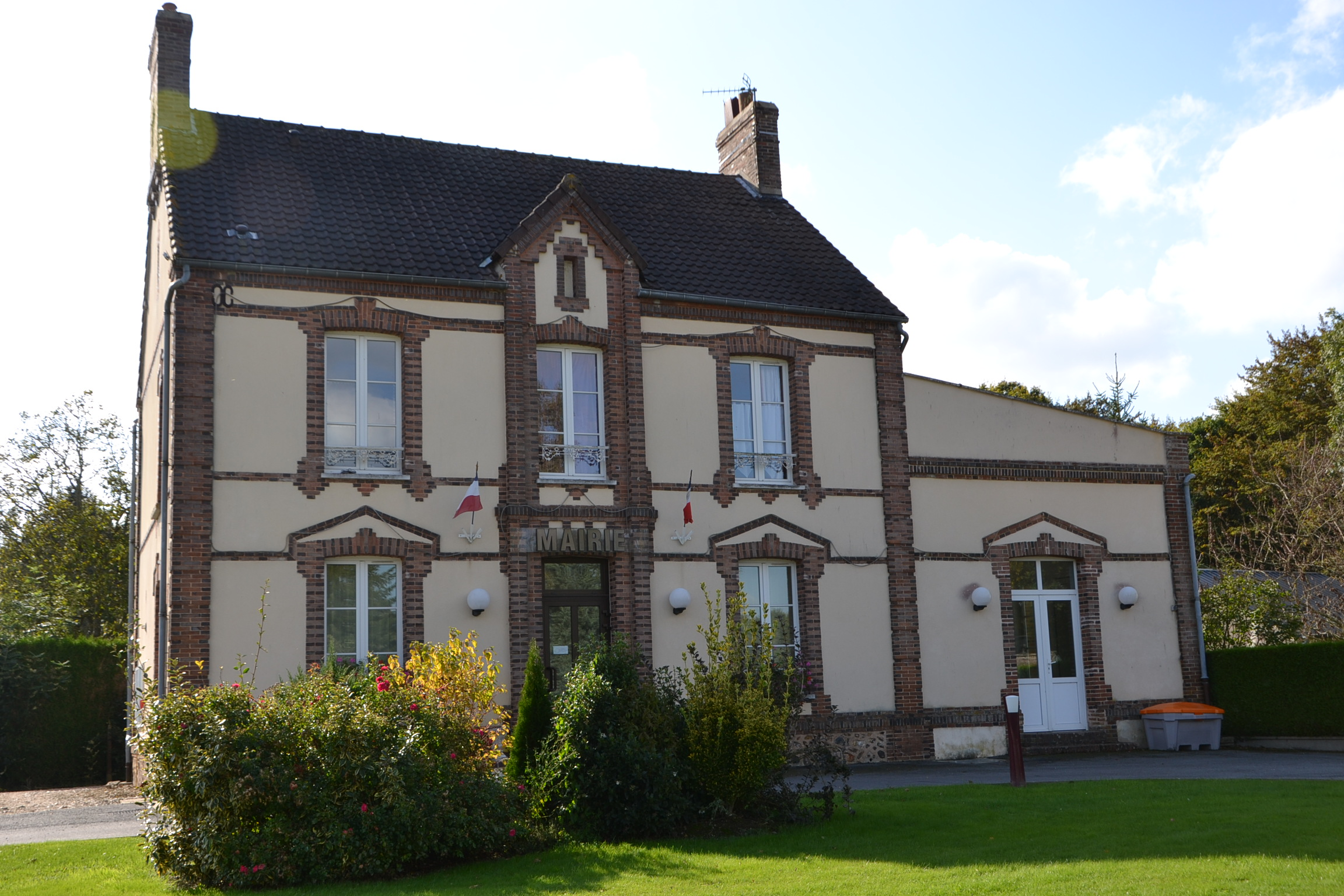 Mairie de Vitrai-sous-l'Aigle (61).